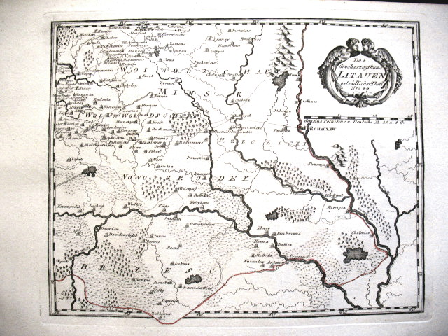 Des Grosherzogthums Litauen ostsüdlicher Theil. Nro. 47. Kolorierter Kupferstich